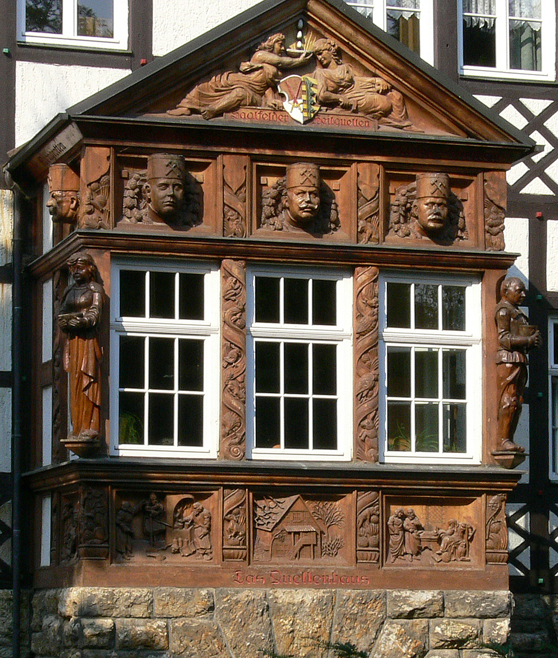 Saalfeld-Garnsdorf: Feengrotten, Erker am Hauptgebäude, dem ehemaligen Quellenhaus